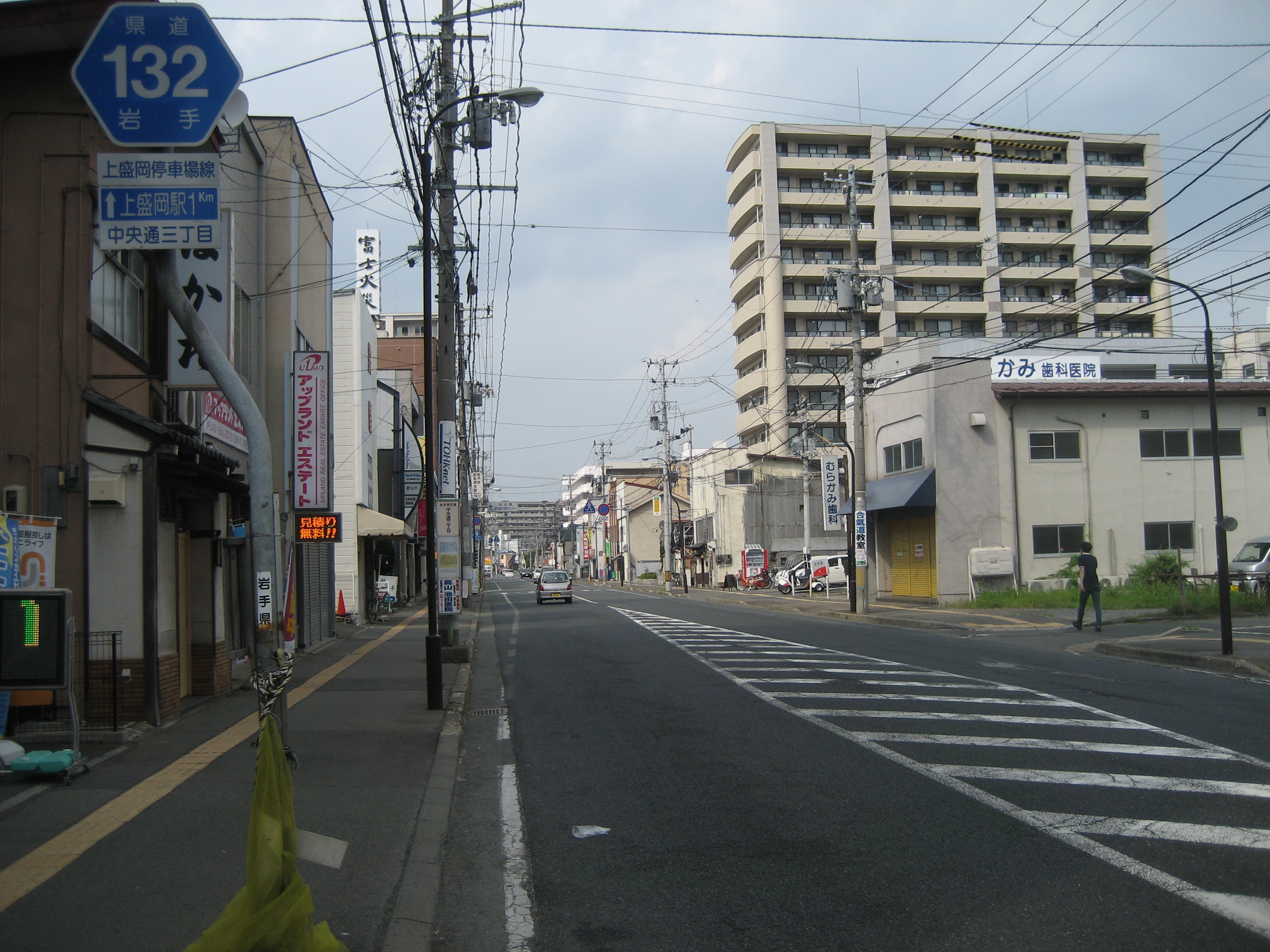 岩手県道132号線盛岡市中央通3丁目付近